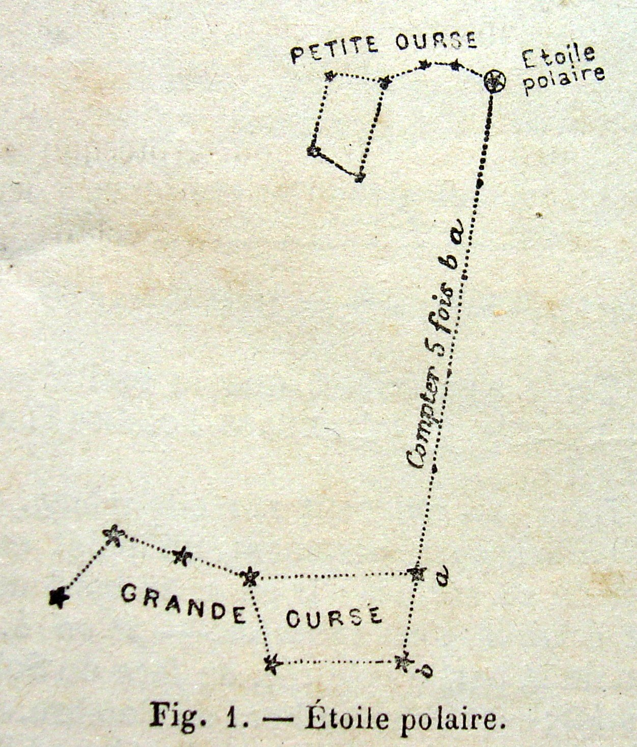 Trouver l'étoile polaire